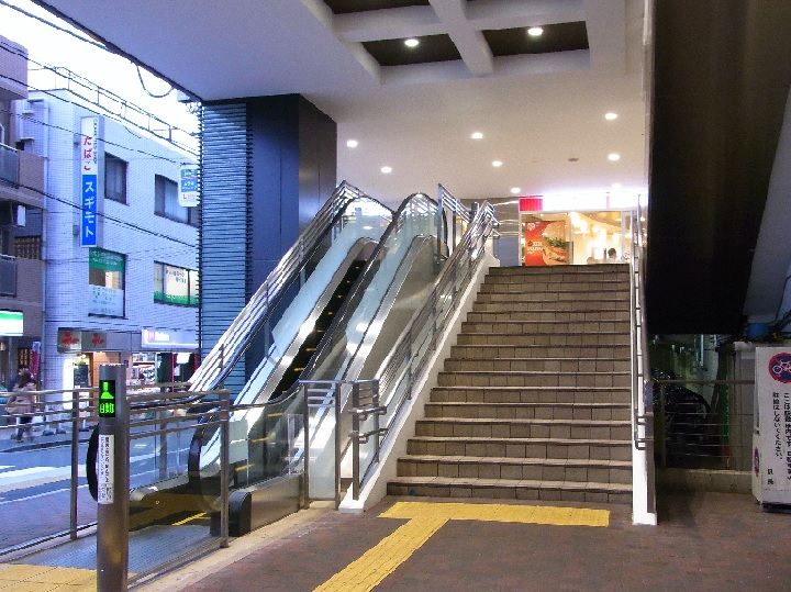 小田急小田原線・東京メトロ千代田線代々木上原駅の北口です（2012年4月撮影）。